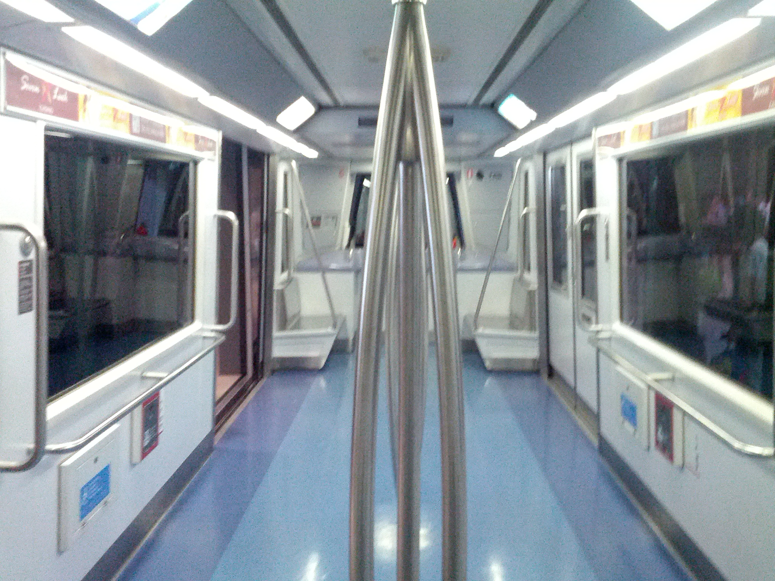 인천공항 스타라인 열차 내부